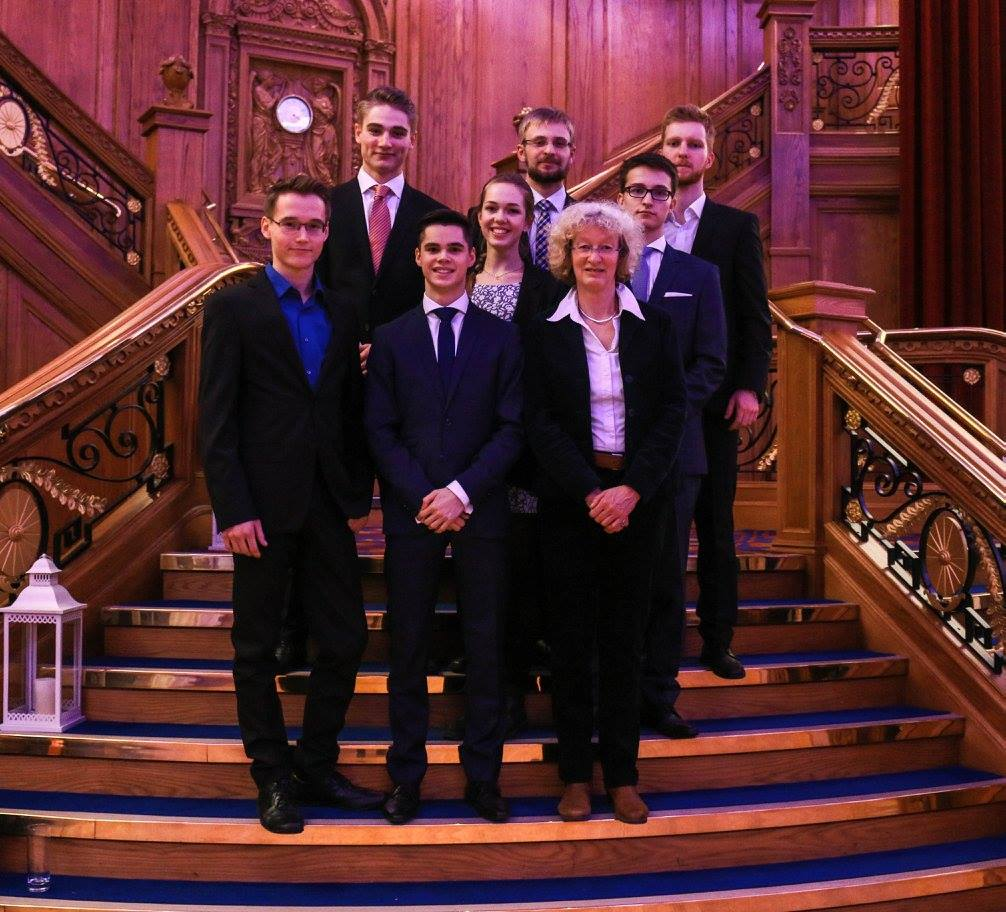 Die Delegation des Fridericianums bei der Internationalen Sitzung in Belfast: Max Lange, Jan-Eric Fähnrich, Gregor Heilborn, Erik Jahn, Jakob Horn und Lehrerin Anette Uffmann.